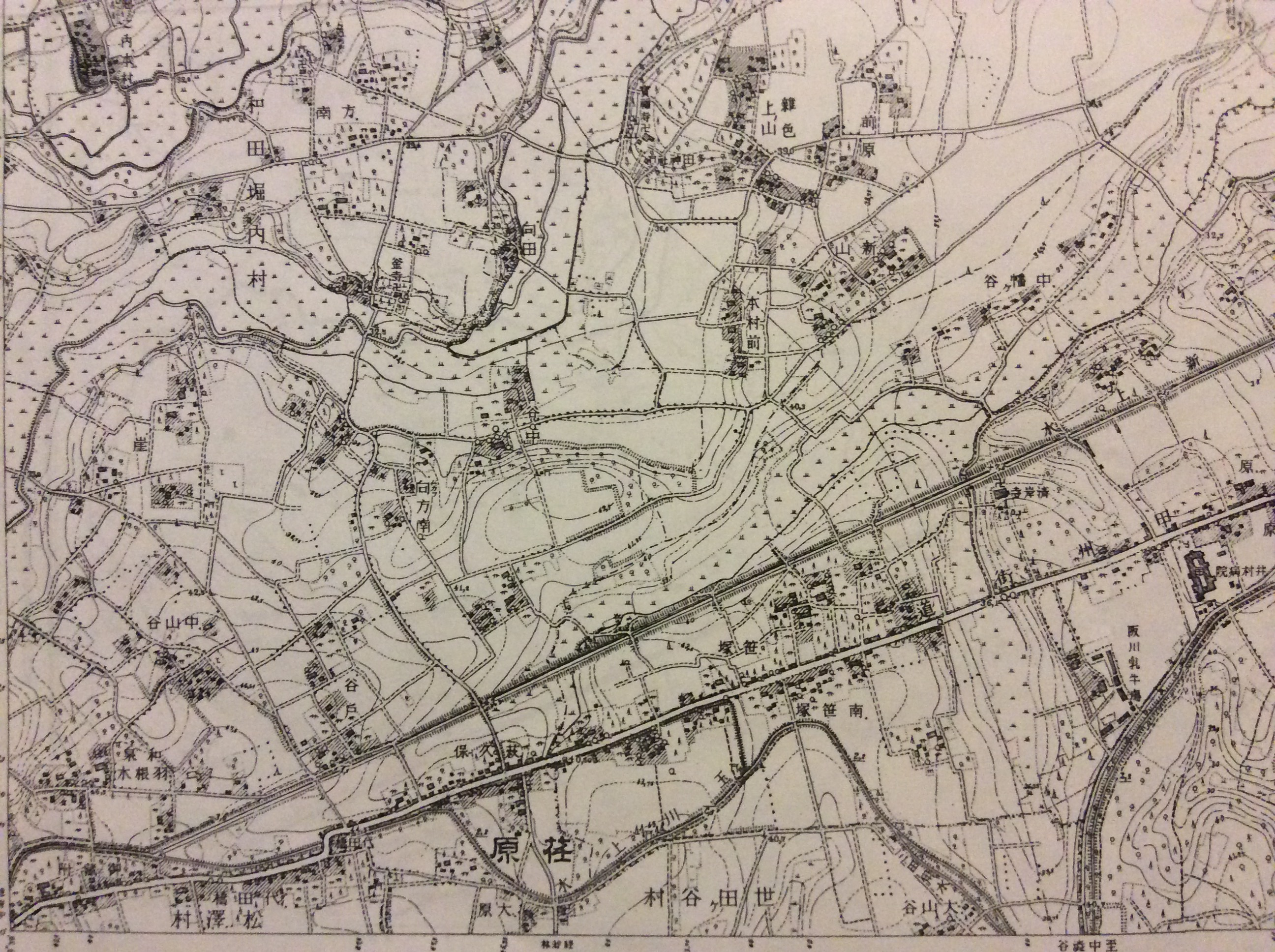 明治43年、1万分1地形図（2014年12月24日撮影）